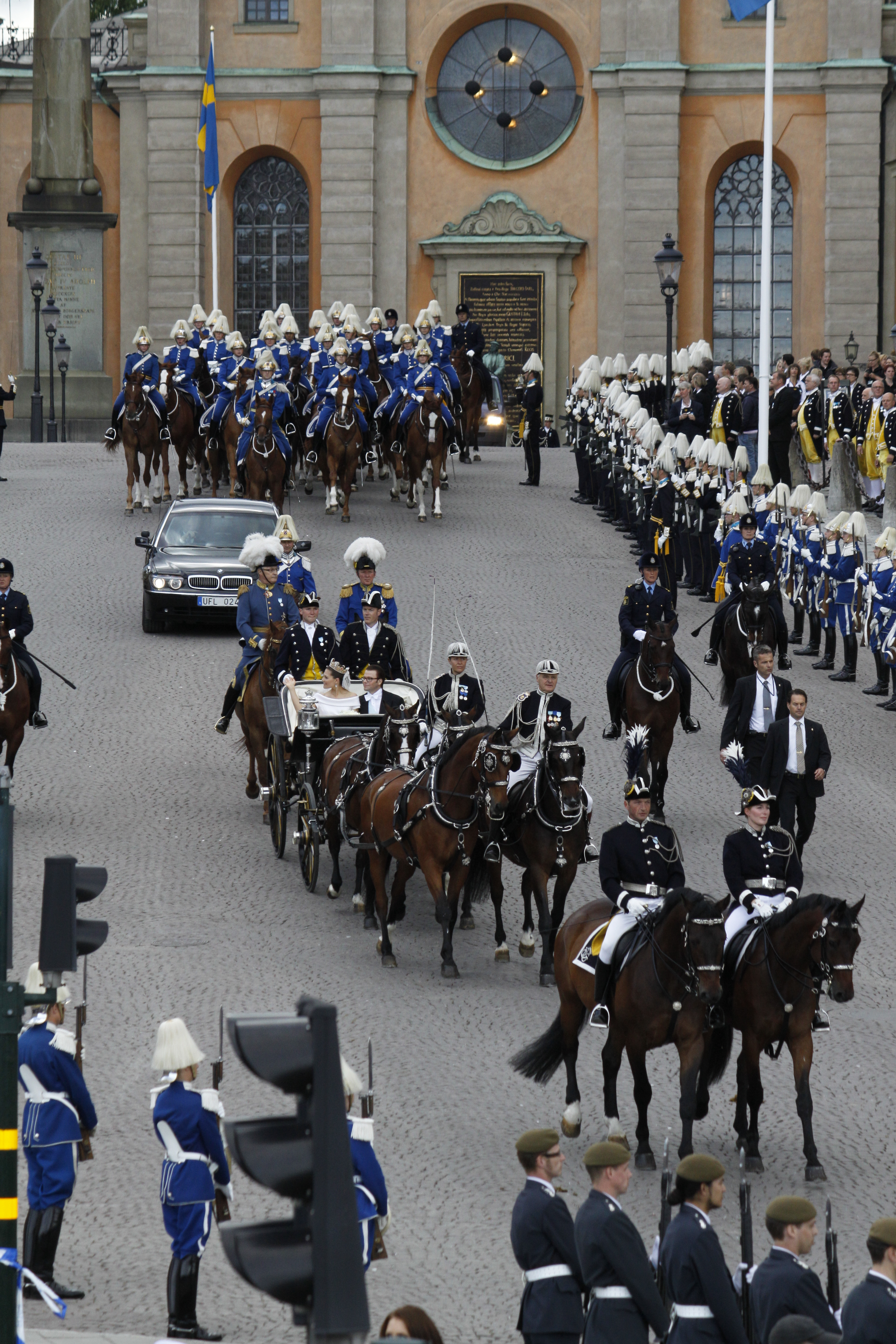 cortège